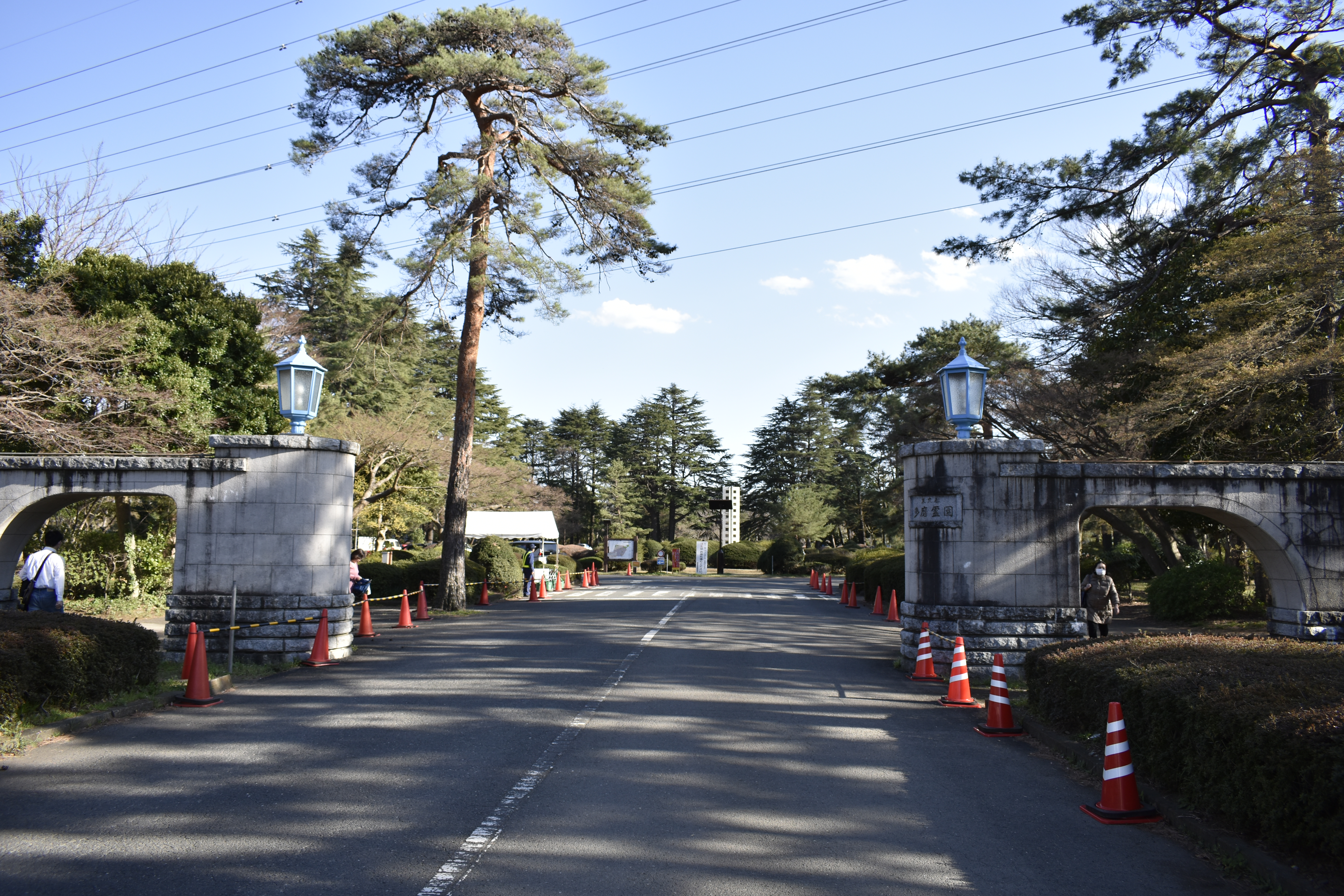 多磨霊園 小金井門 Nikon D3400